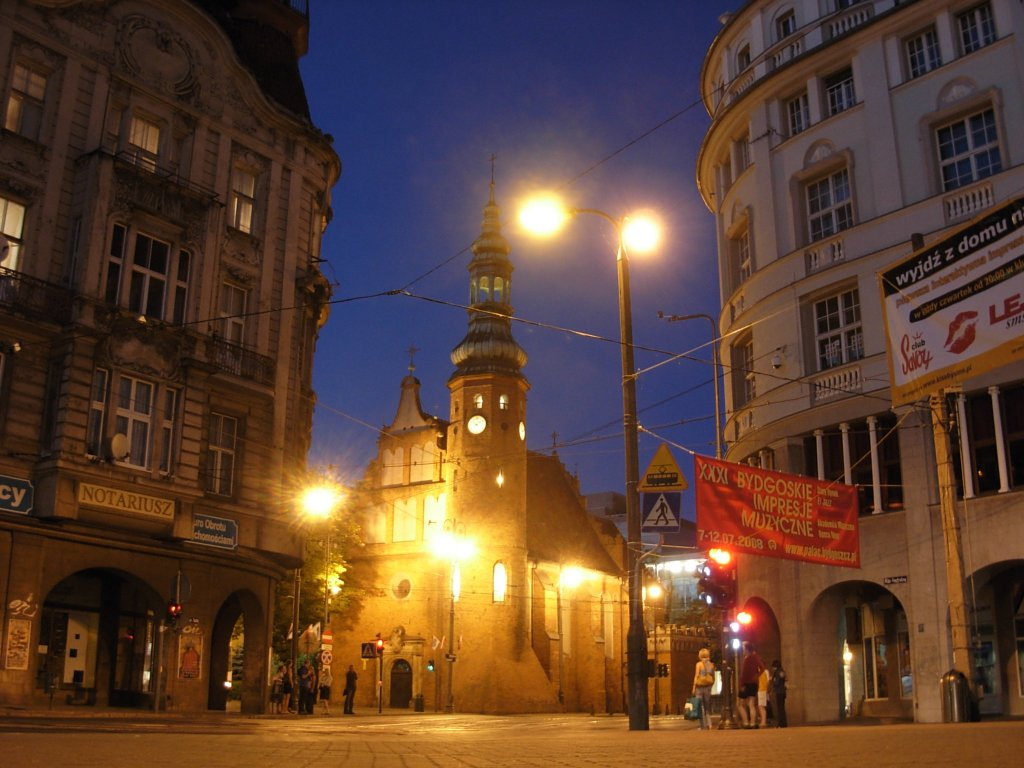 Kościół Klarysek w Bydgoszczy